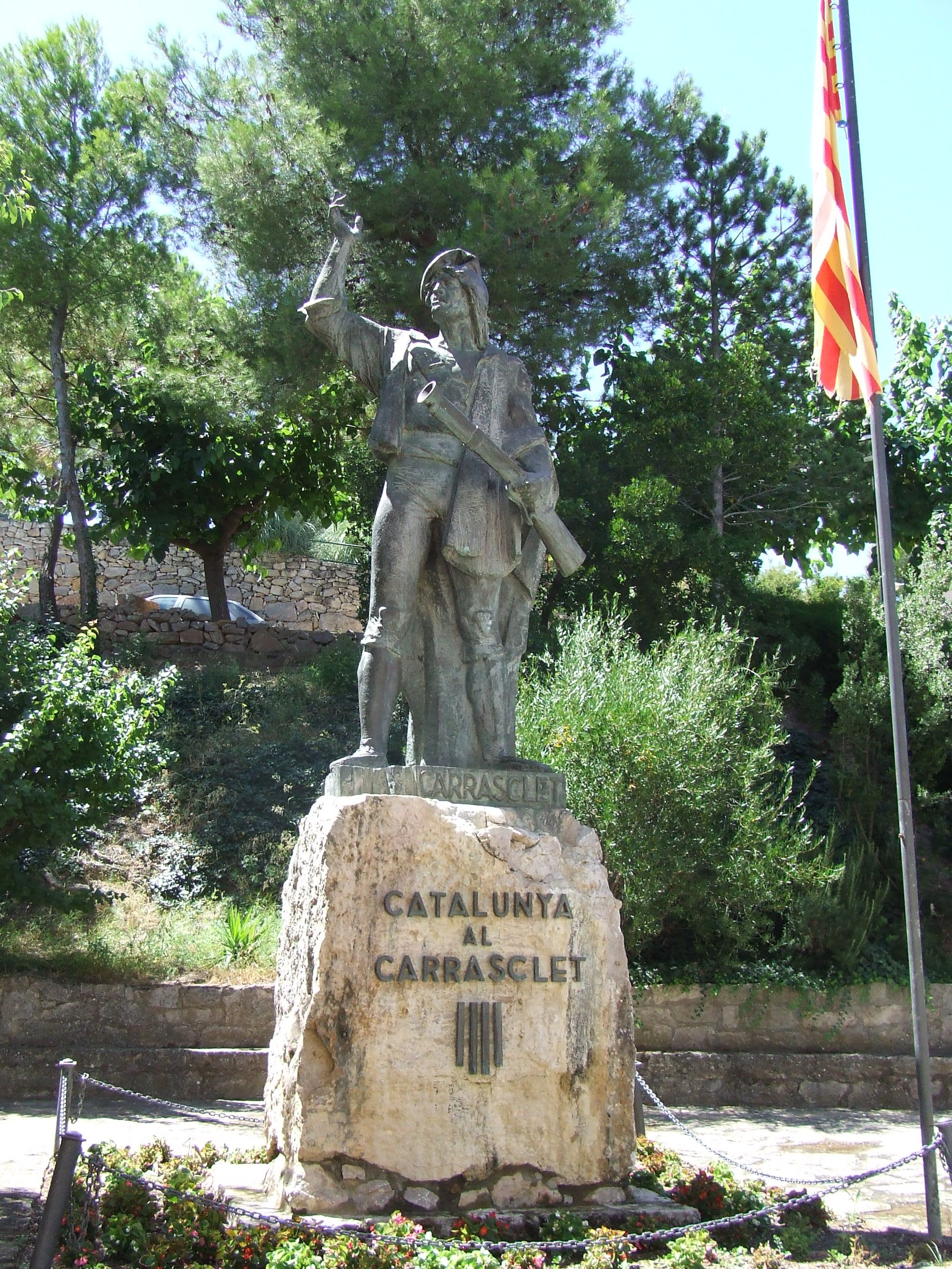 Monument a Pere Joan Barceló i Anguera, "Carrasclet", al seu poble natal de Capçanes